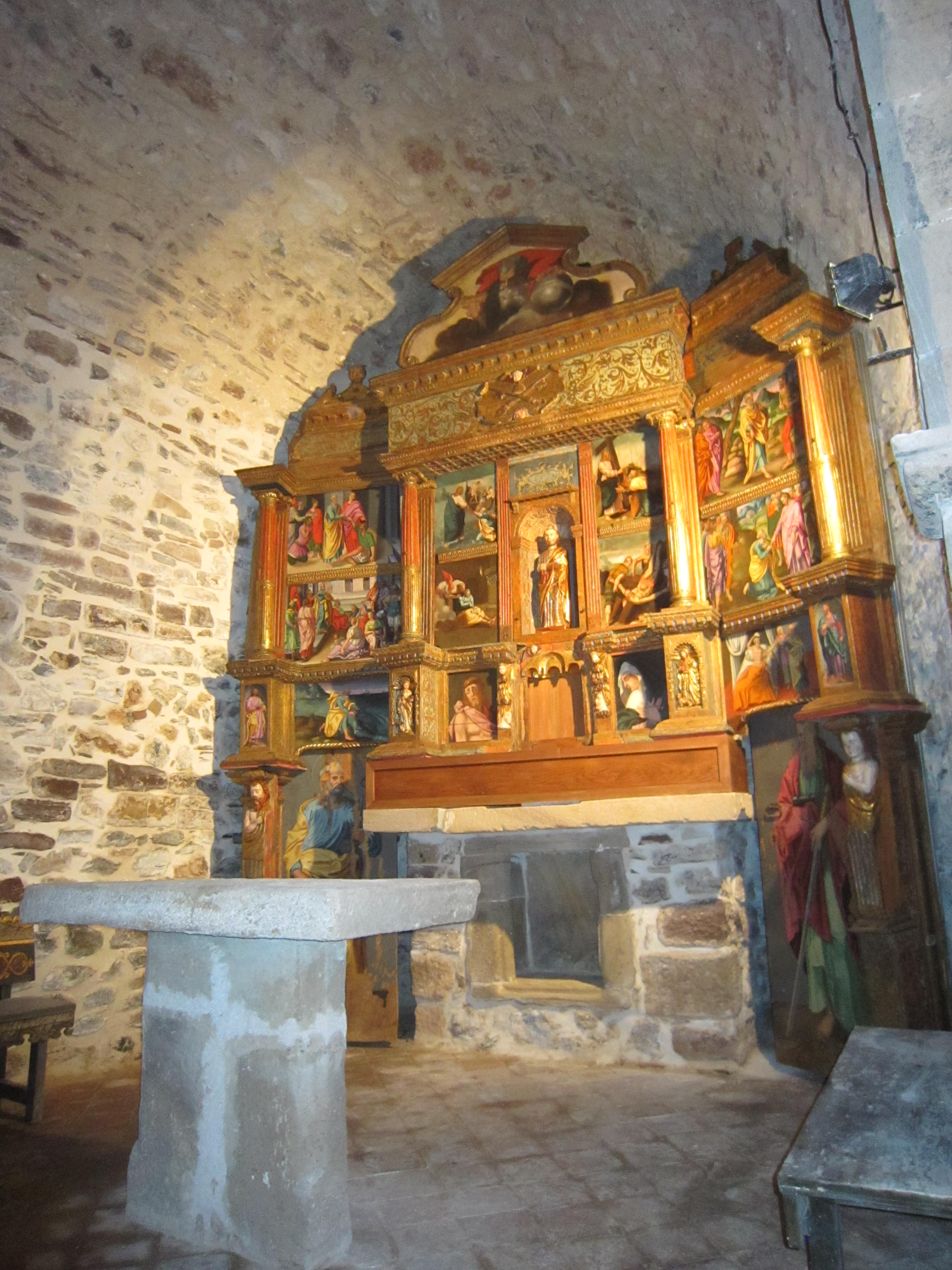 Ermita de Sant Pere de Vallcàrquera, interior. Vista de l'altar i el retaule (Figaró-Montmany)